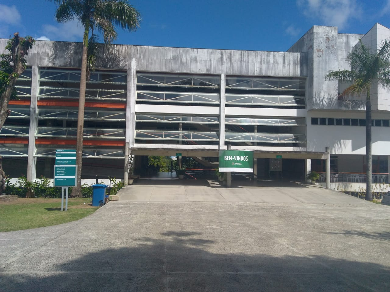 Interior das instalações do Campus Cabula da Escola Bahiana de Medicina e Saúde Pública, Salvador - BA